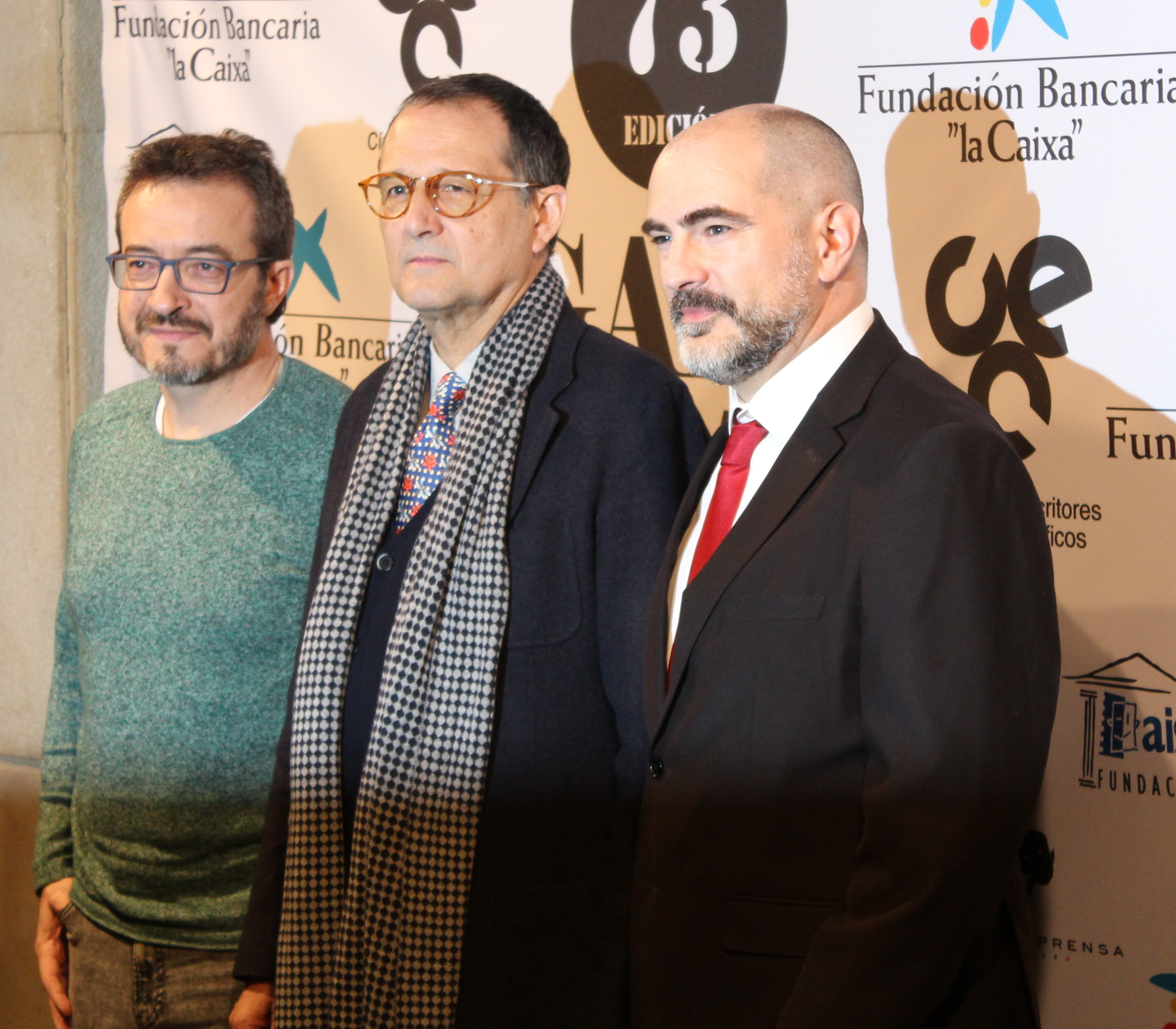 Algunos miembros del equipo de la película española Zona hostil en la 73 edición de las Medallas del Círculo de Escritores Cinematográficos: el músico Roque Baños, el productor Javier López Blanco y el director Adolfo Martínez.